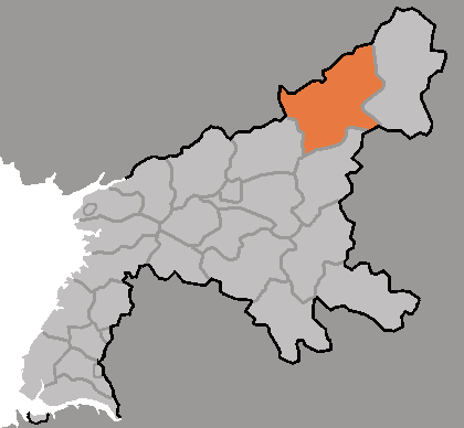 Map of Nyongwon, Pyongan-namdo, DPRK, 2006